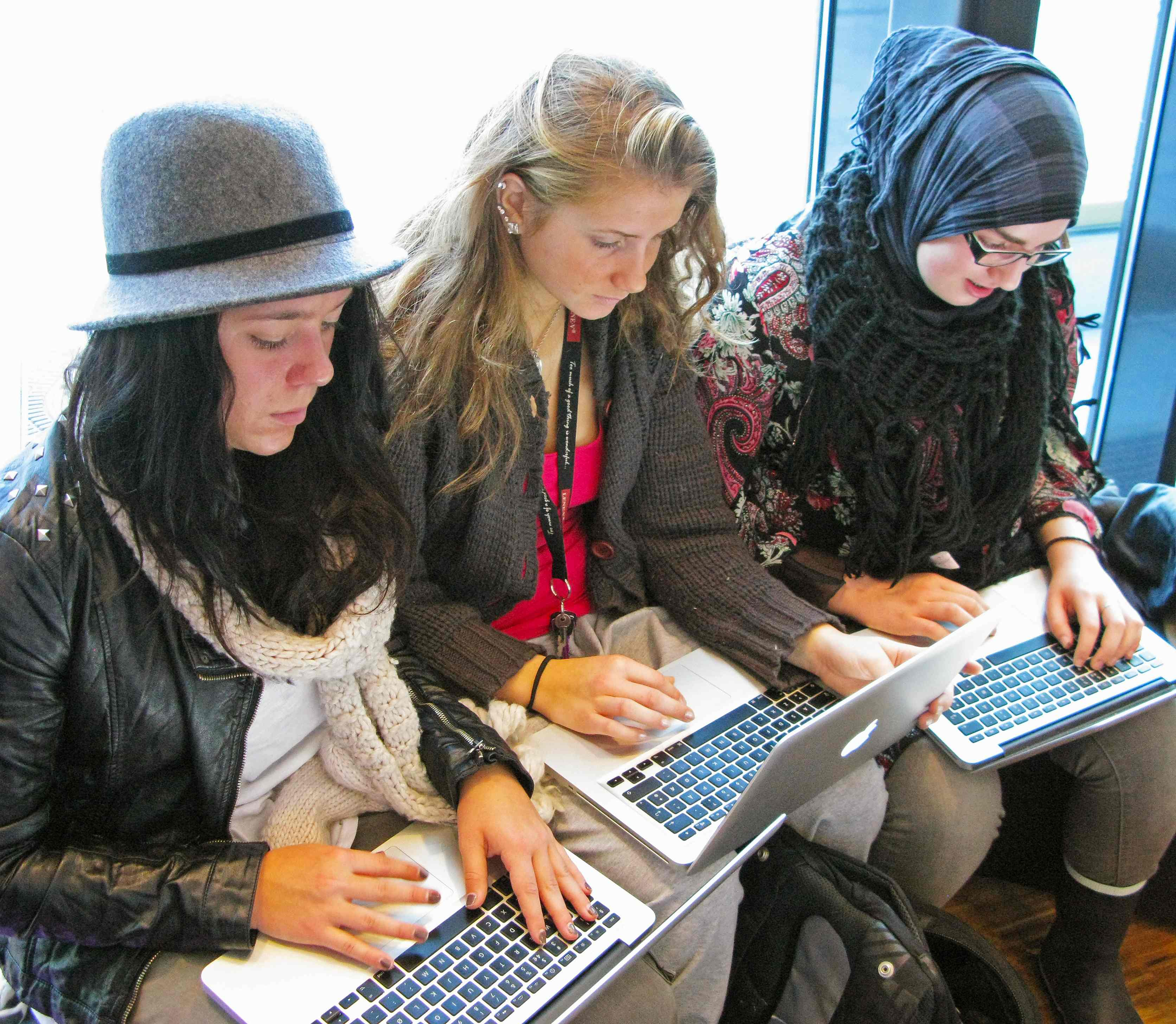 Fyrstikkalleen skole: Alle elevene på videregående har får disponere egen bærbar Mac.